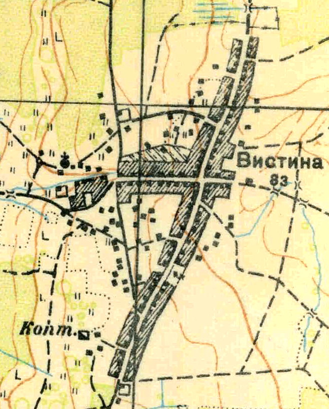 Топографическая карта Ленинградской области, квадрат О-35-9-Г-б (Вистина), деревня Вистино